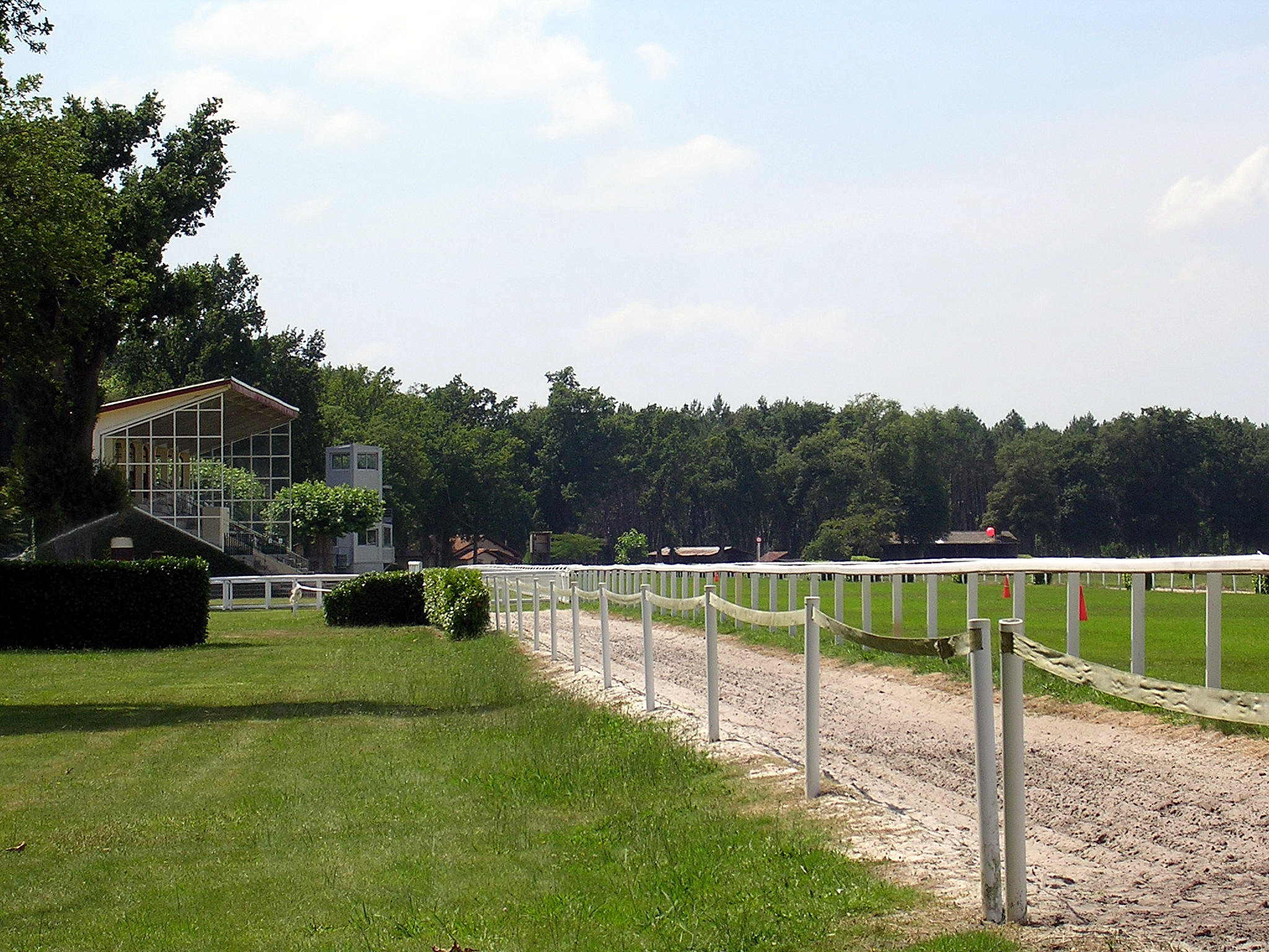 Hippodrome des grands pins à Mont-de-Marsan dans les Landes (France)